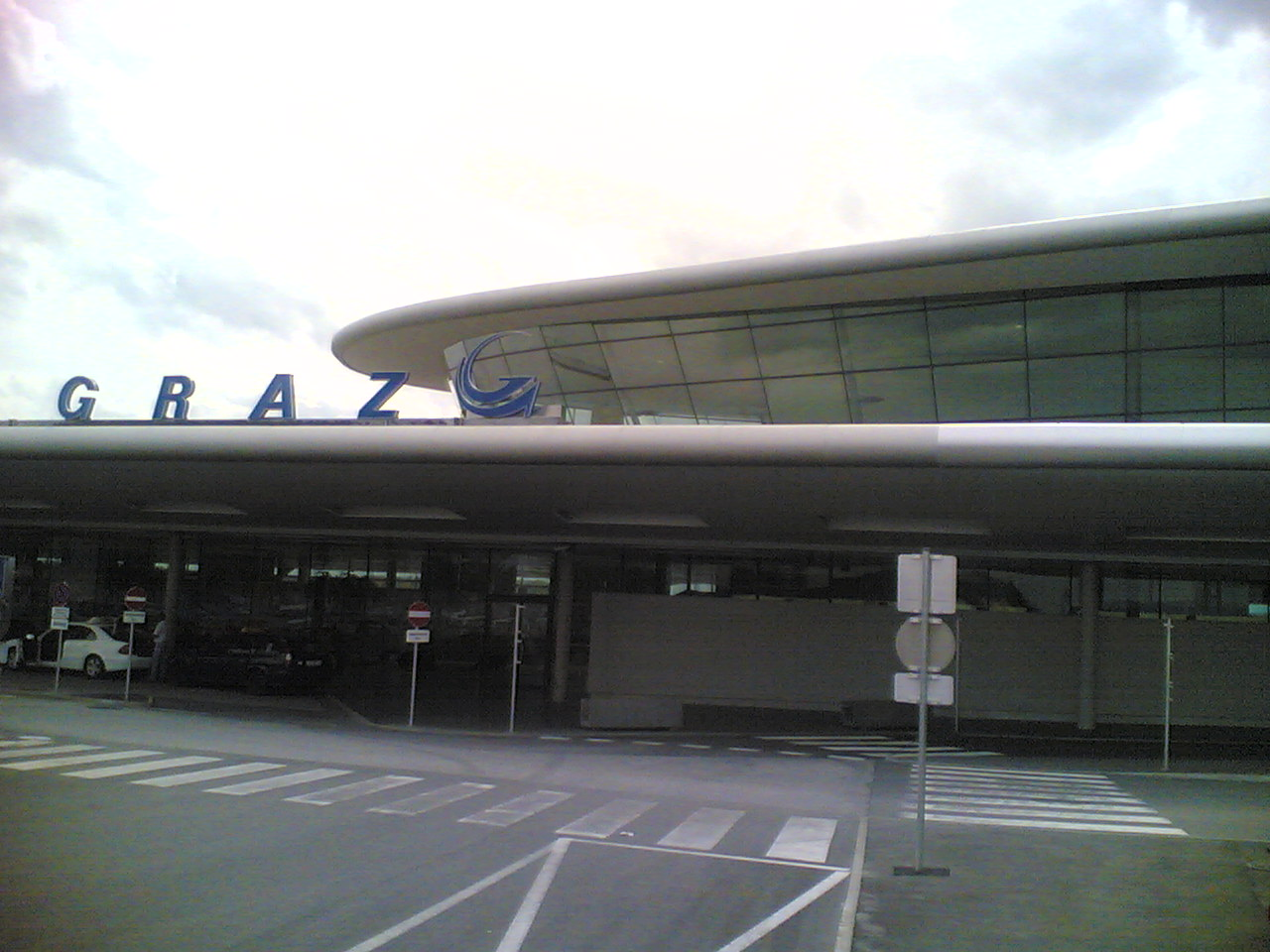 Graz airportGraz airport